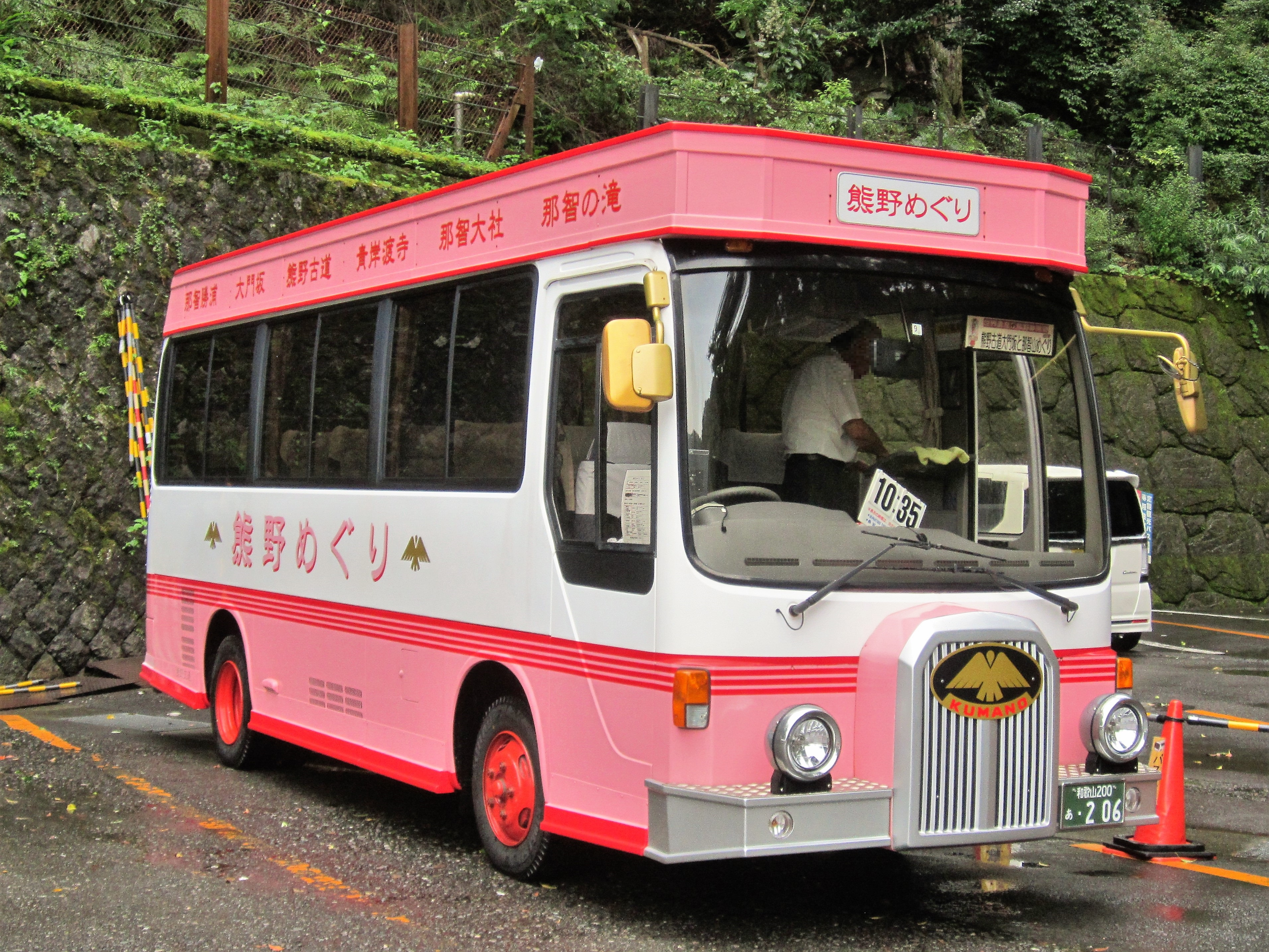 那智の滝付近に停車する熊野交通「熊野めぐり号」